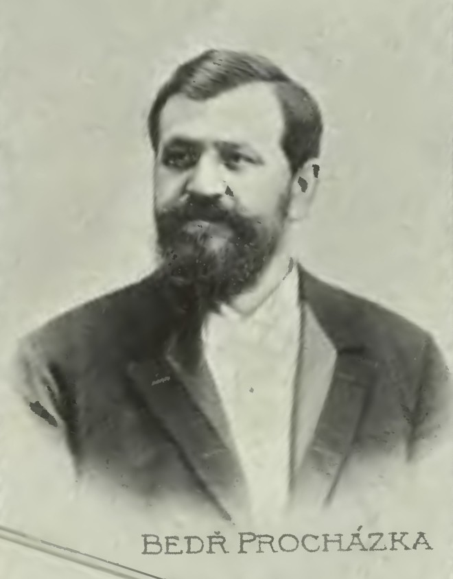 Portrét – Bedřich Procházka (1855 - 1934), Český matematik.